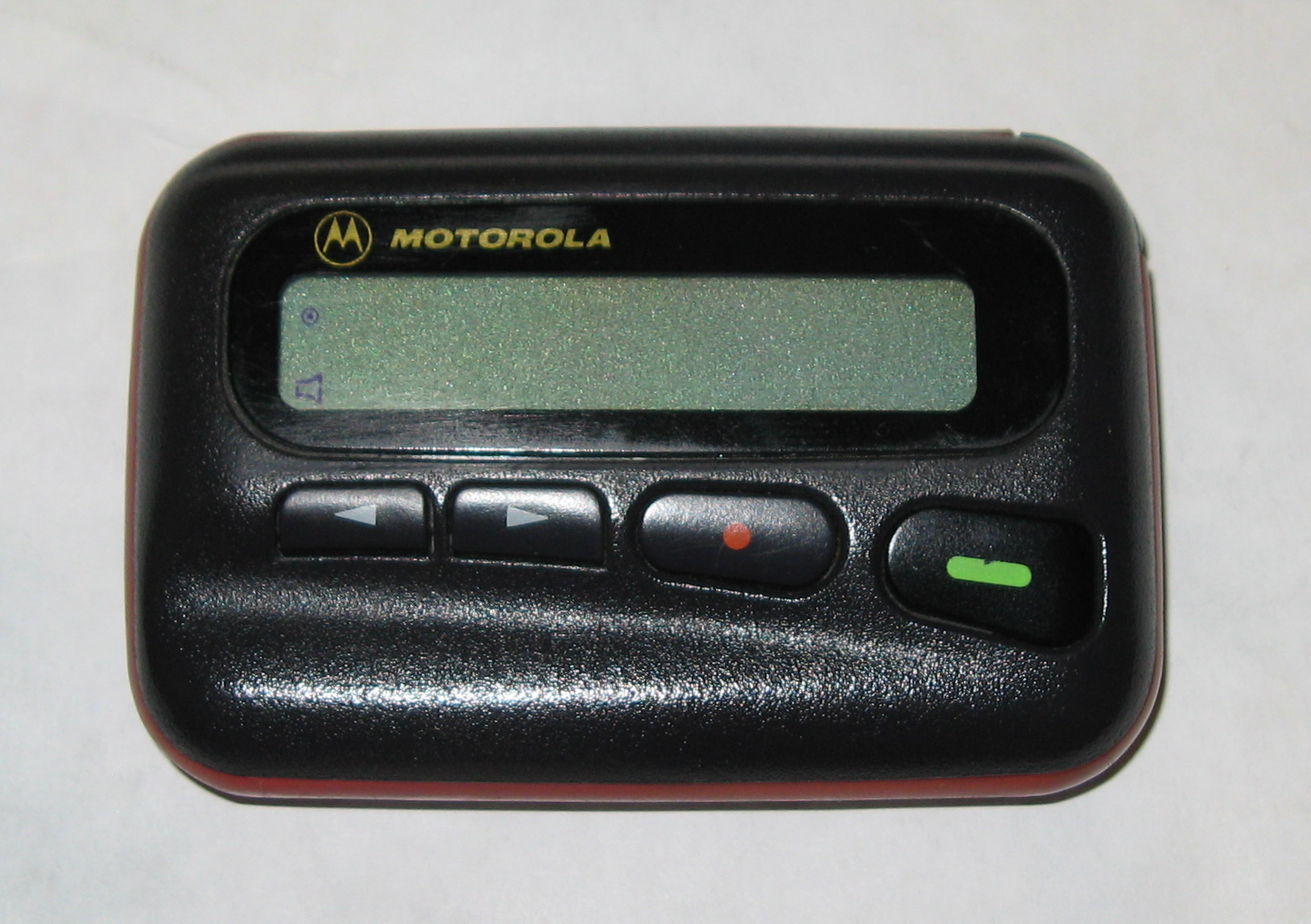 Digitaler Meldeempfänger (DME) Motorola LX2 plus